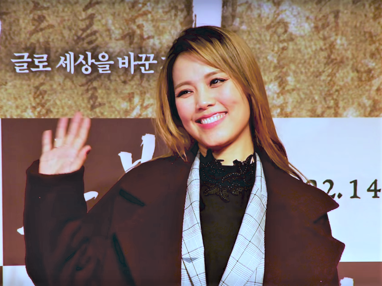 영화 '흥부' VIP시사회 포토월